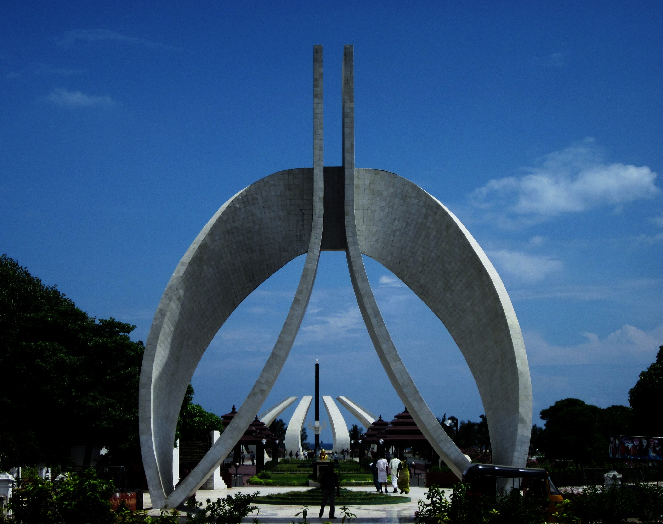 சென்னையிலுள்ள எம்ஜிஆரின் நினைவிடம்